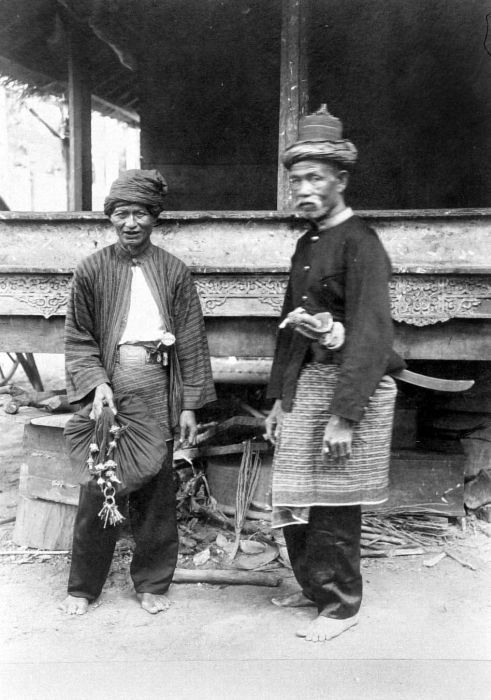 Negatief. Districtshoofd Wabil en volgeling, Atjeh